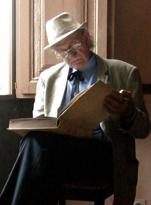 Josep Montserrat i Torrents llegint